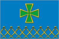 Флаг Казанского сельского поселения, Краснодарский край, Россия.